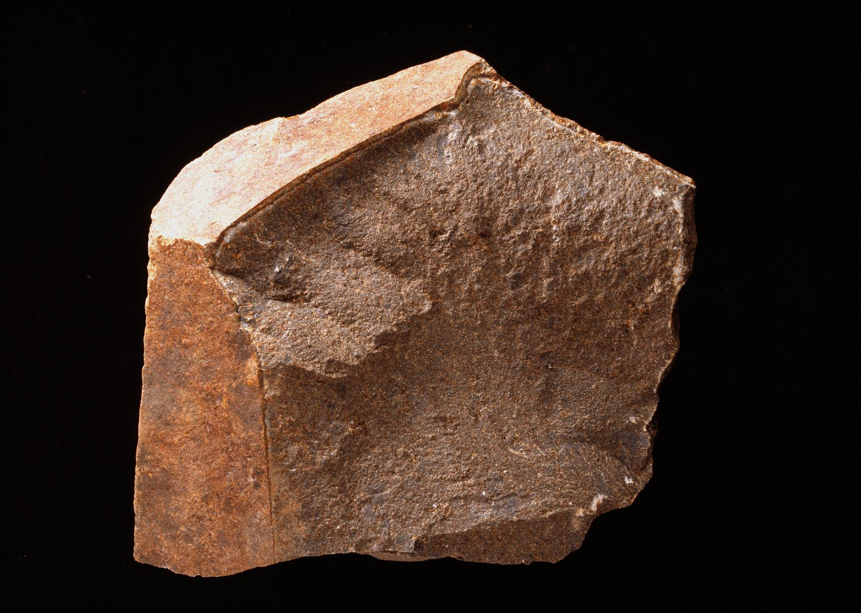 Hälsinglands landskapssten, delleniten är bara exponerad på ett par ställen på den landtunga som skiljer norra och södra Dellensjöarna åt. Bergarterna är märkliga och vållade länge forskarna huvudbry, tills de kom på att delleniten kunde vara en bergart som hade bildats vid ett meteoritnedslag. Vid undersökningar i mikroskop visade det sig bland annat att kvartskornen i delleniten hade en speciell lamellbildning, som den som finns i kvarts från kratrar som man visste hade orsakats av meteoritnedslag. Nedslagsteorin vann mark. 1992 upptäcktes asteroiden 7704 Dellen som fick sitt namn efter Dellensjöarna. Meteoriten slog ner för 89 miljoner år sedan.